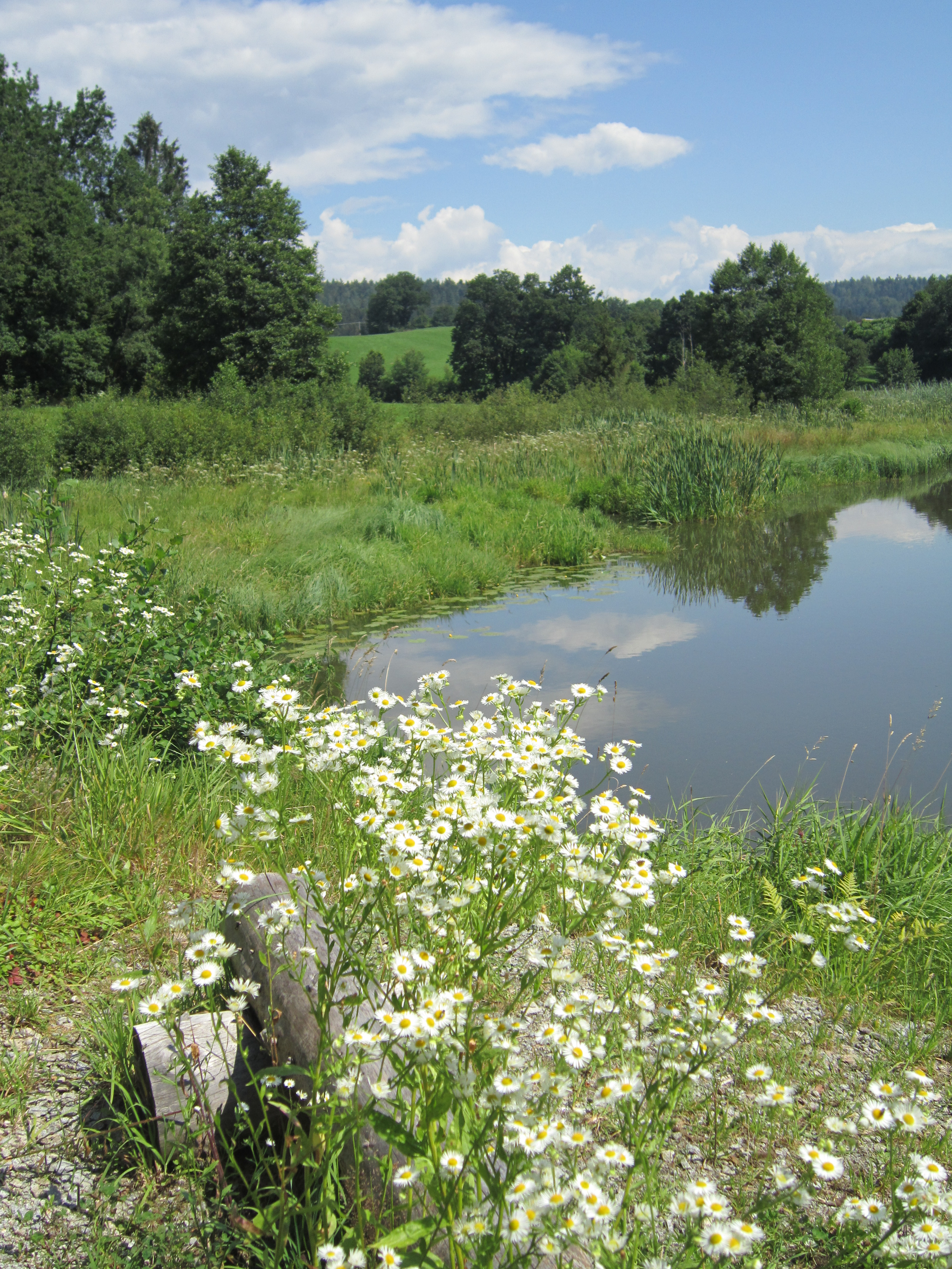 Der Weiher der Kollnbergmühle im Norden der Gemeinde Fürstenstein (Landkreis Passau / Niederbayern) ist der älteste Mühlenweiher Bayerns.